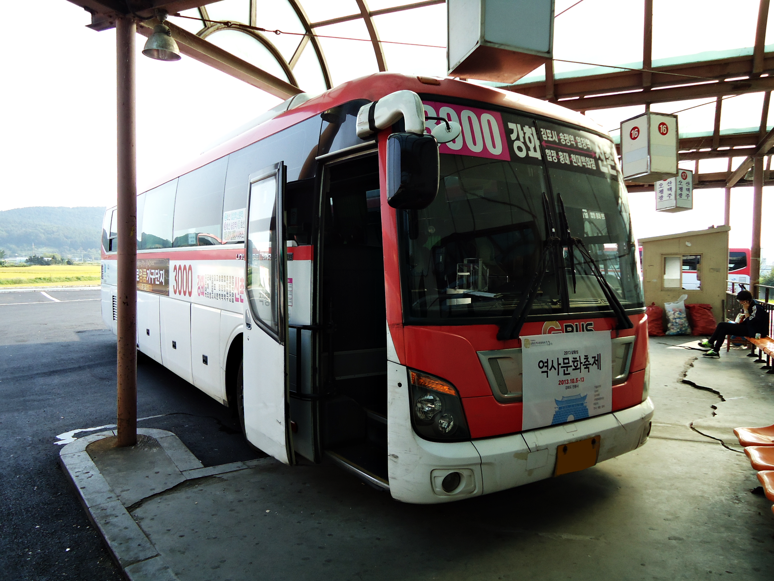 강화운수 유니버스 스페이스 엘레강스 28석 우등. 수도권 직행좌석버스에서 유일한 우등버스입니다. 1대가 운행중입니다.(1대는 37석으로 개조.)